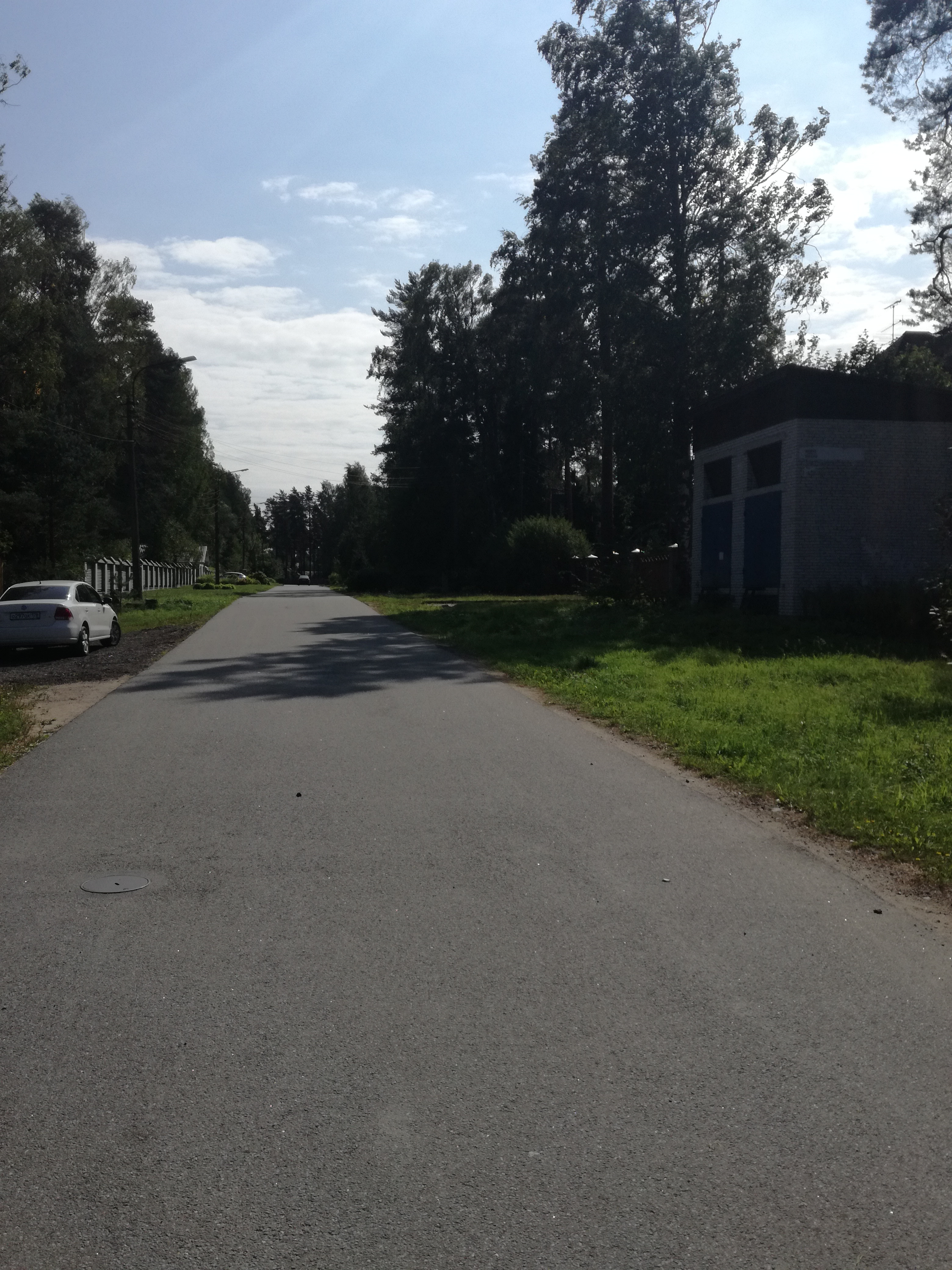 Первомайская улица, Песочный